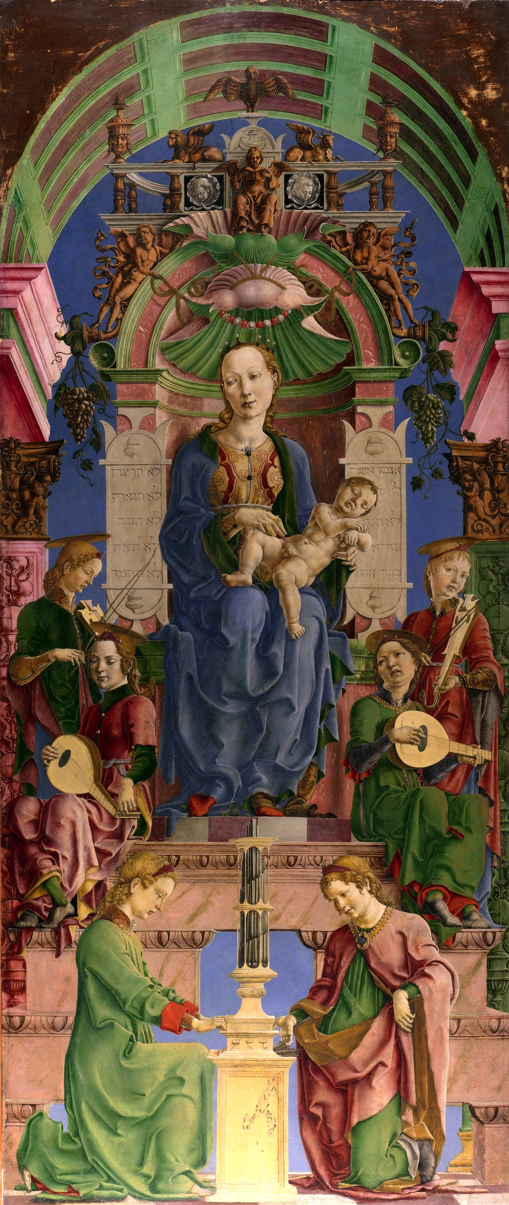 Roverella-Altar für St. Giorgio in Ferrara, Haupttafel, Szene: Thronende Madonna und musizierende Engel